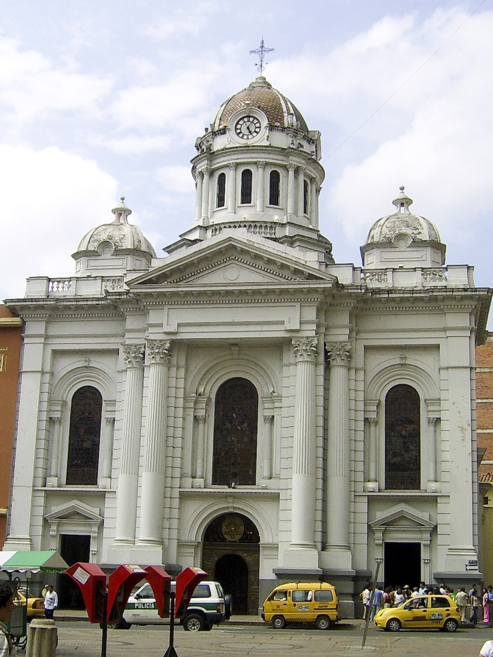 Catedral de San Pedro, Santiago de Cali, Colombia